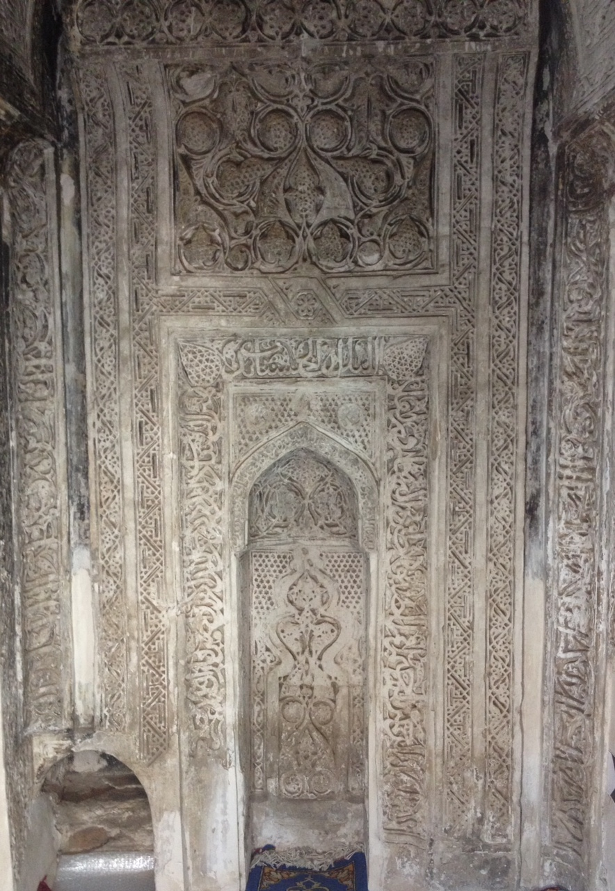 مسجد شیخ بسطامی